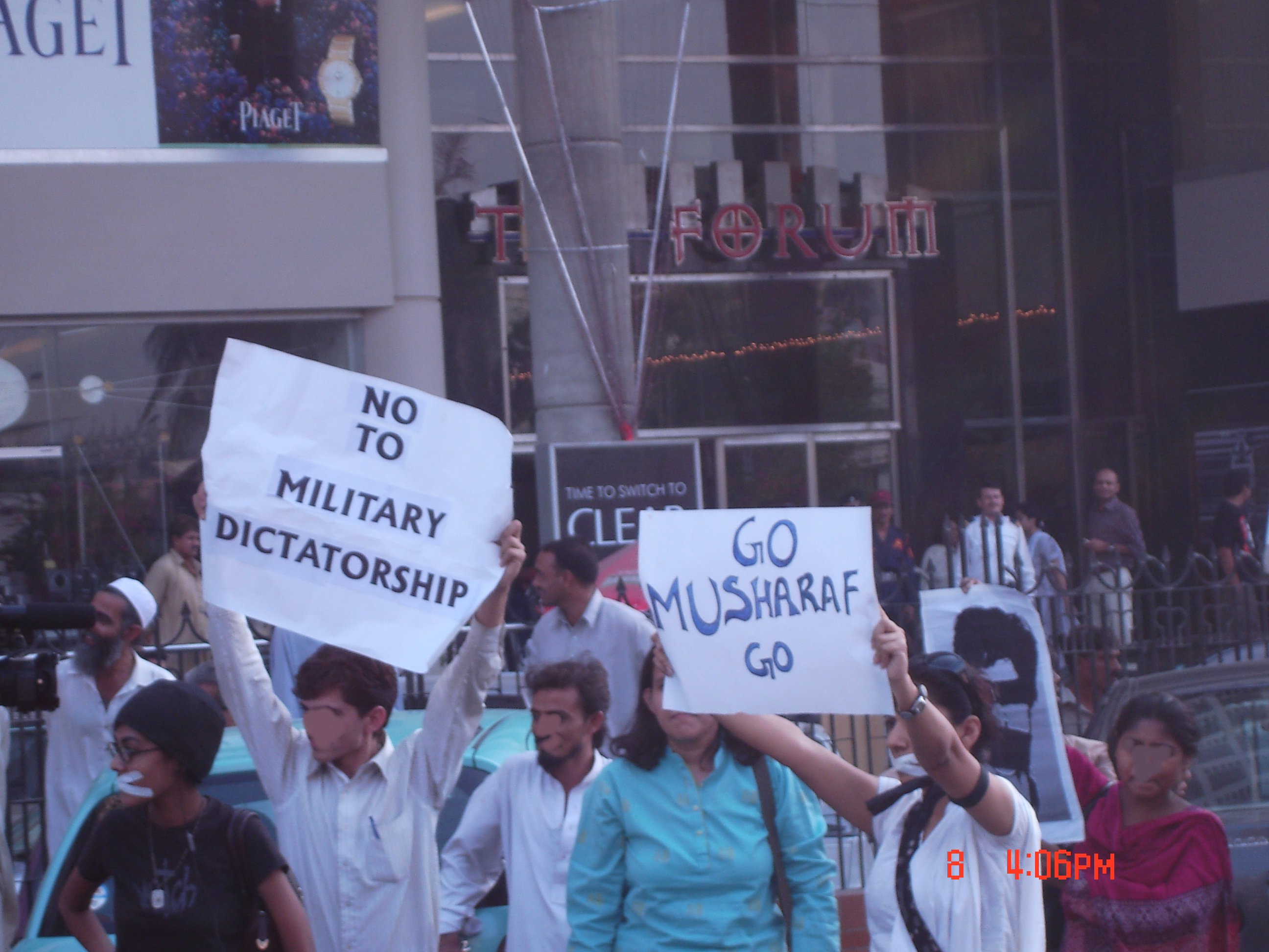 מפגינים נגד פרבז מושארף בפקיסטן